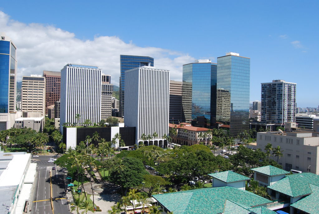 downtown view 1